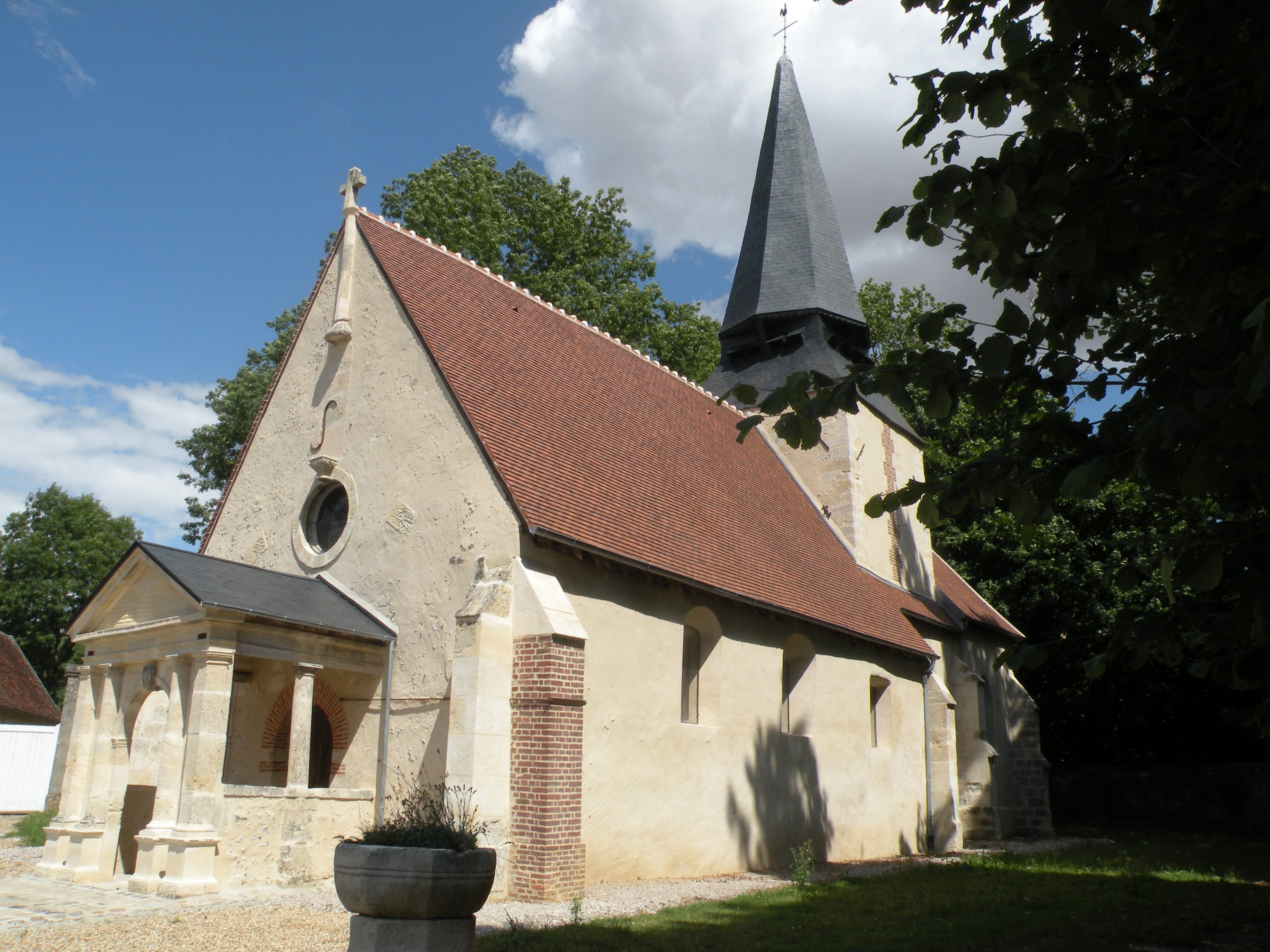 église de la vierge, Montherlant (Oise)